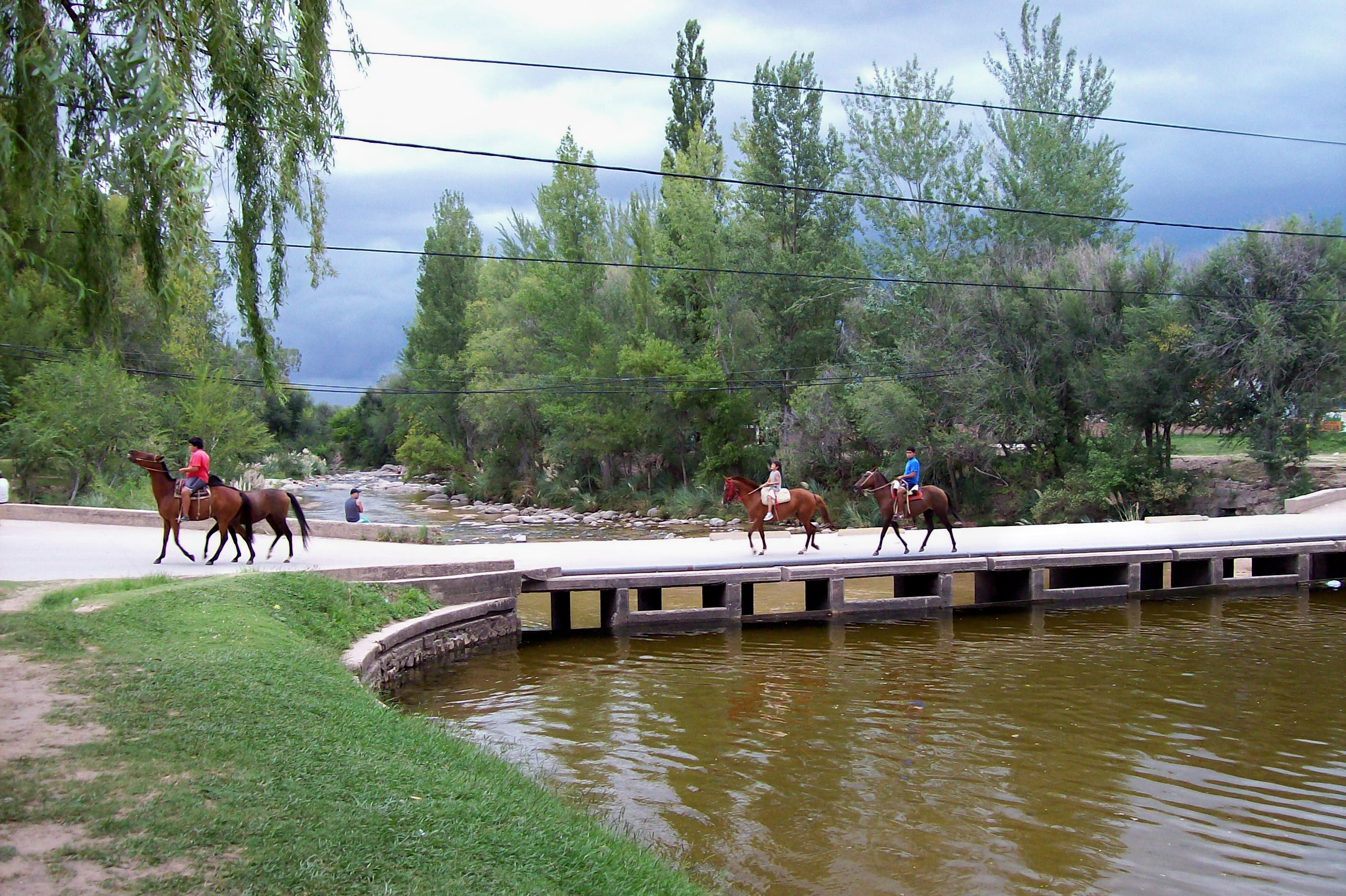 puente sobre el Río Panaholma (calle Cura Gaucho), en Villa Cura Brochero